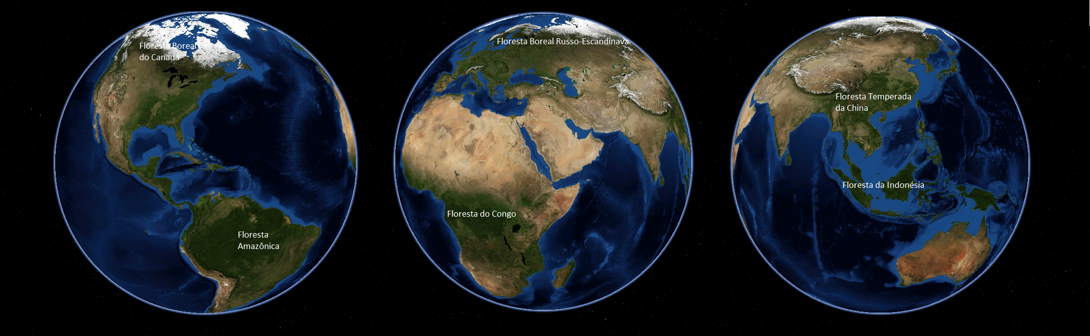 NASA World Wind 1.4 usado